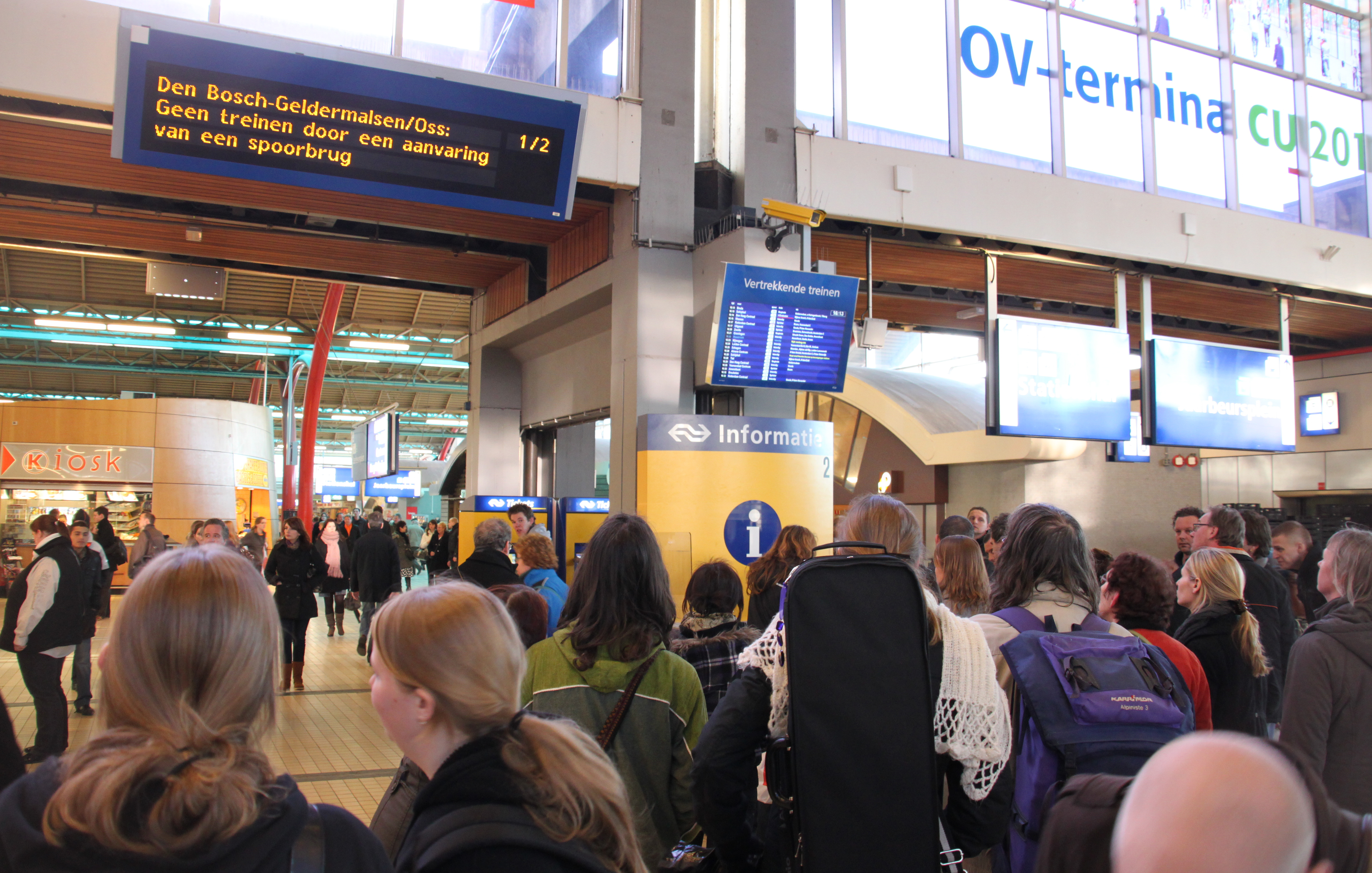 Informatieverstrekking voor treinreizigers bij verstoringen, zoals hier in Utrecht.